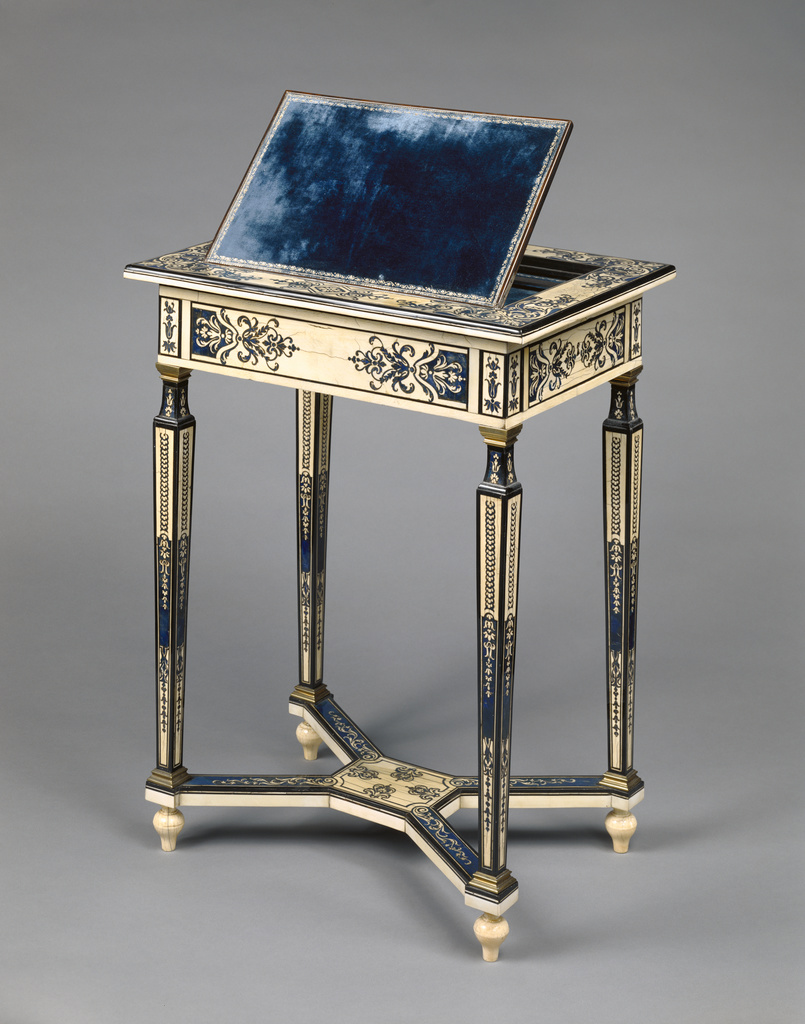 table à écrire, plaquée d'ivoire et de corne